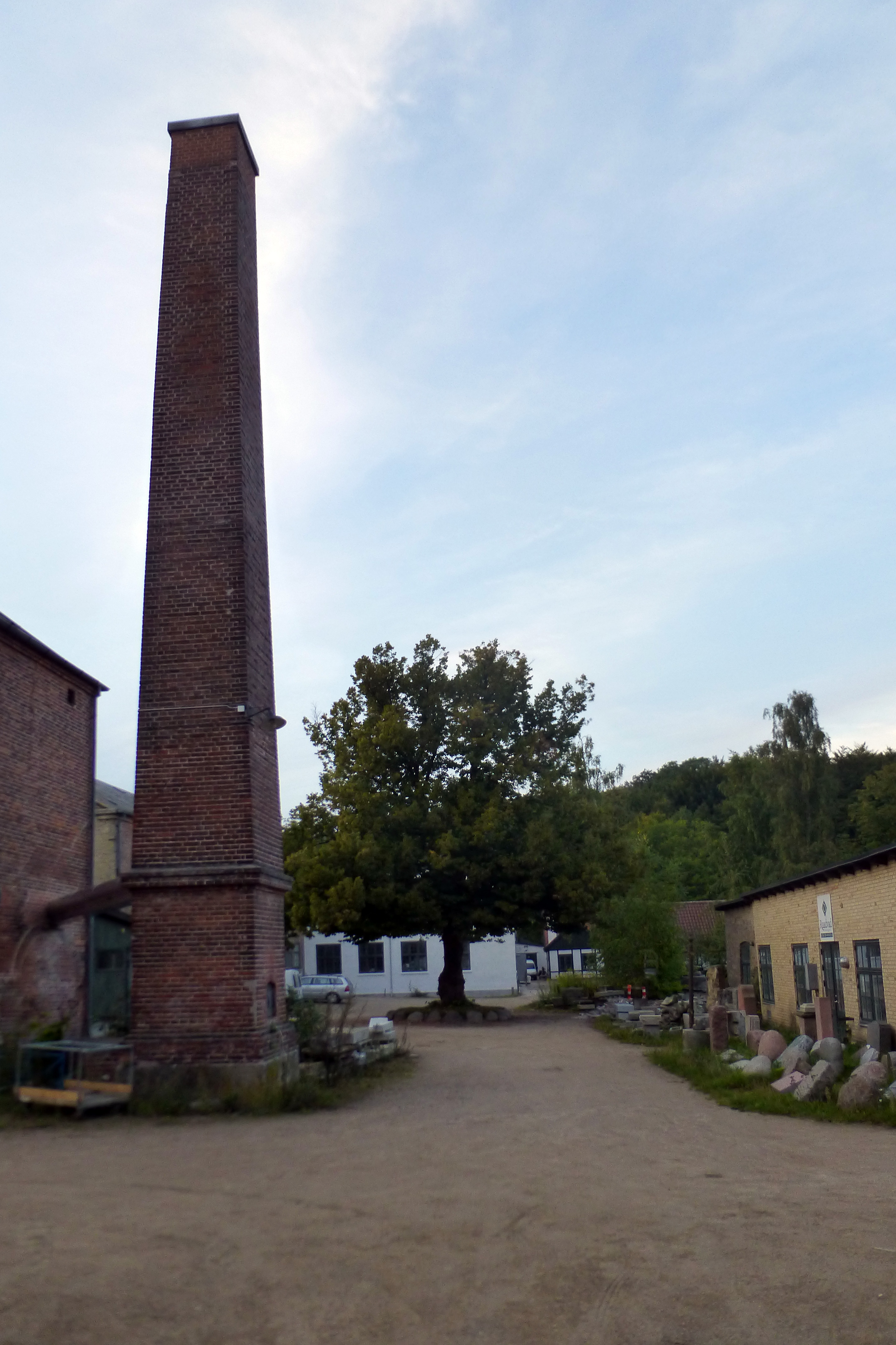 Raadvad fabrikker ved Mølleåen